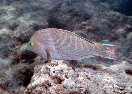 Anampses cuvier (Syn. Anampses cuvieri)